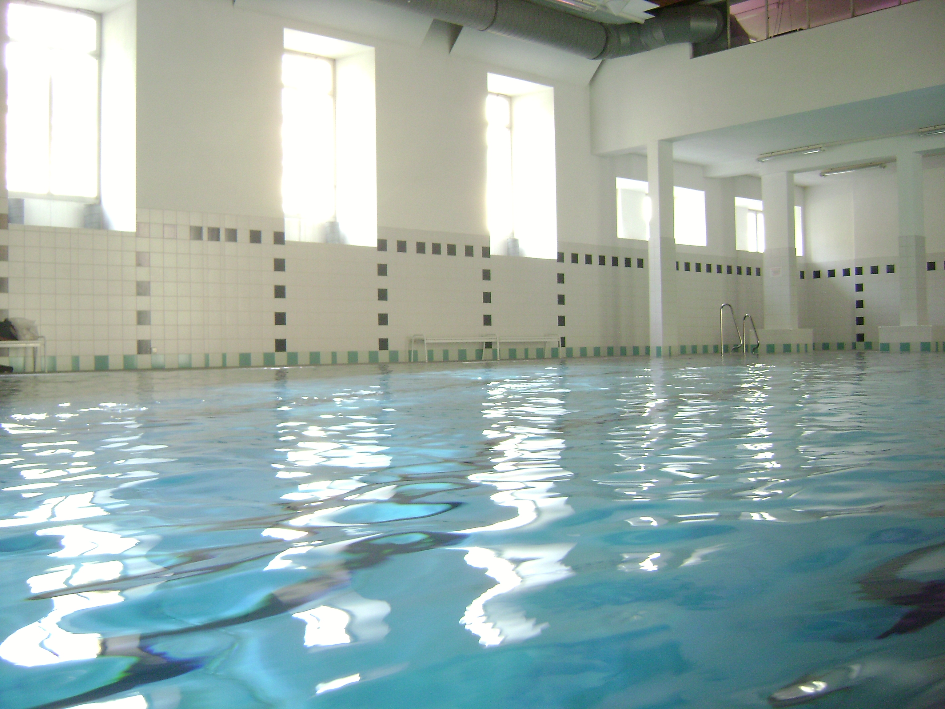 Schwimmbad im Theresianum